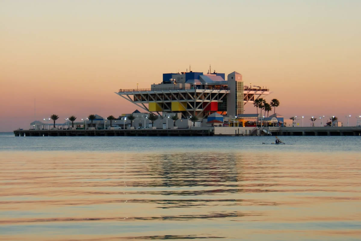 The St. Petersburg Pier